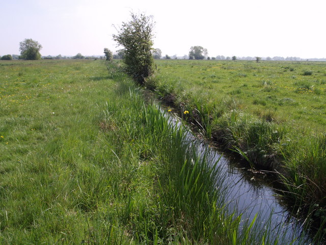 Drain on levels